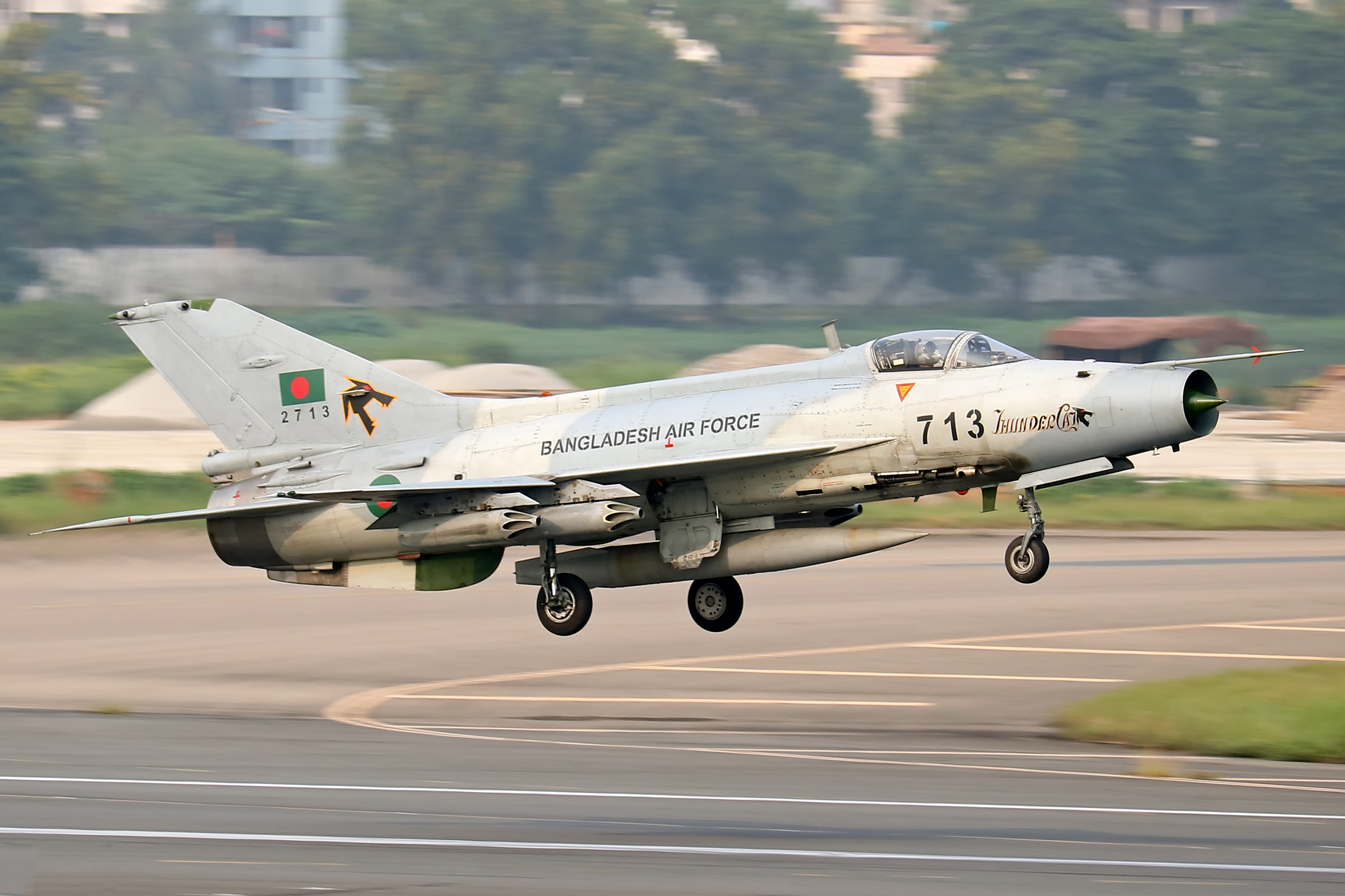 VGHS 2018.